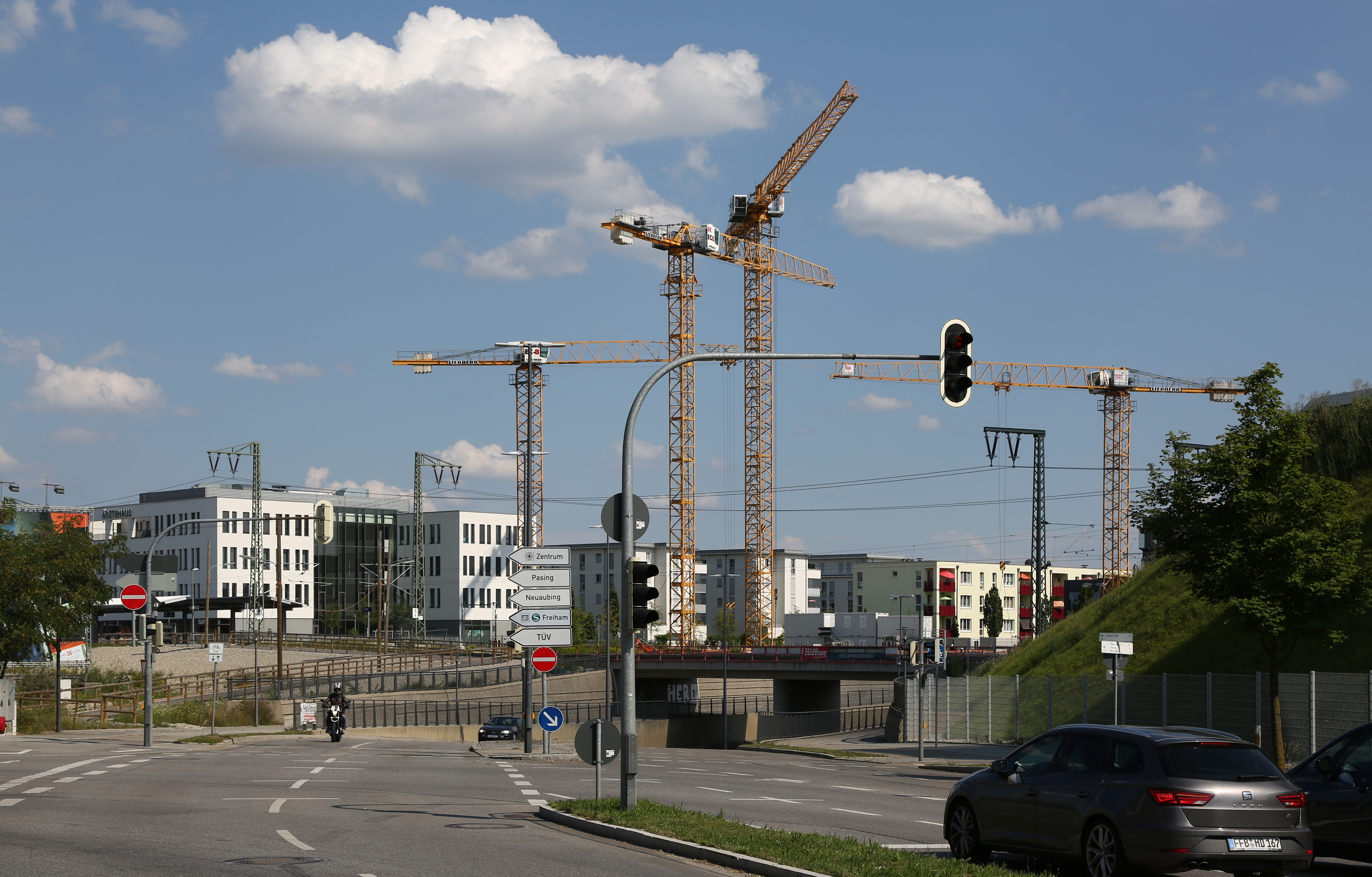 München-Freiham: Ein Stadtteil im Bau. Das Bild zeigt das das Gewerbegebiet südlich der Bodenseestraße.